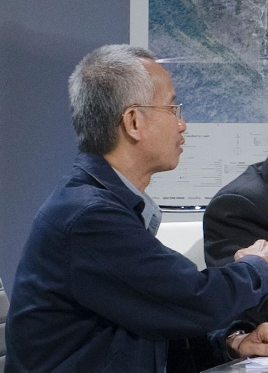 นายกรัฐมนตรีร่วมรับฟังความคิดของกลุ่มเครือข่ายคนไทยหัวใจรักชาติ ณ NBT วันอาทิตย์ ที่ 8 สิงหาคม พ.ศ.2553 (Photographer attached to the Prime Minister of the Kingdom of Thailand : Peerapat Wimolrungkarat / พีรพัฒน์ วิมลรังครัตน์)